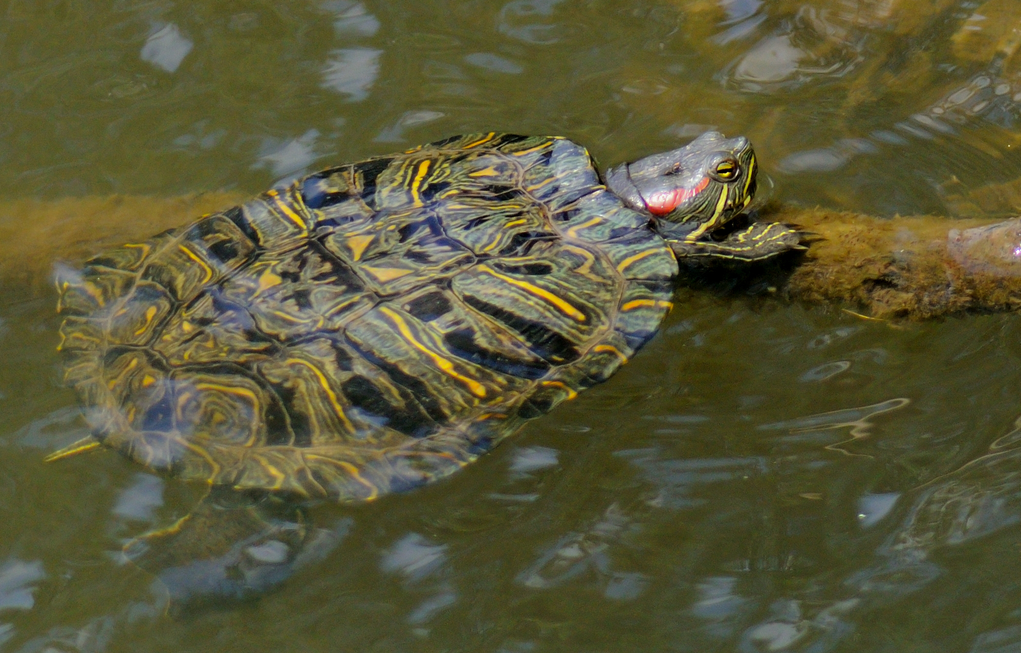 Tortue de Floride dans l'étang du château de la chasse (forêt de Montmorency - Val d'Oise)